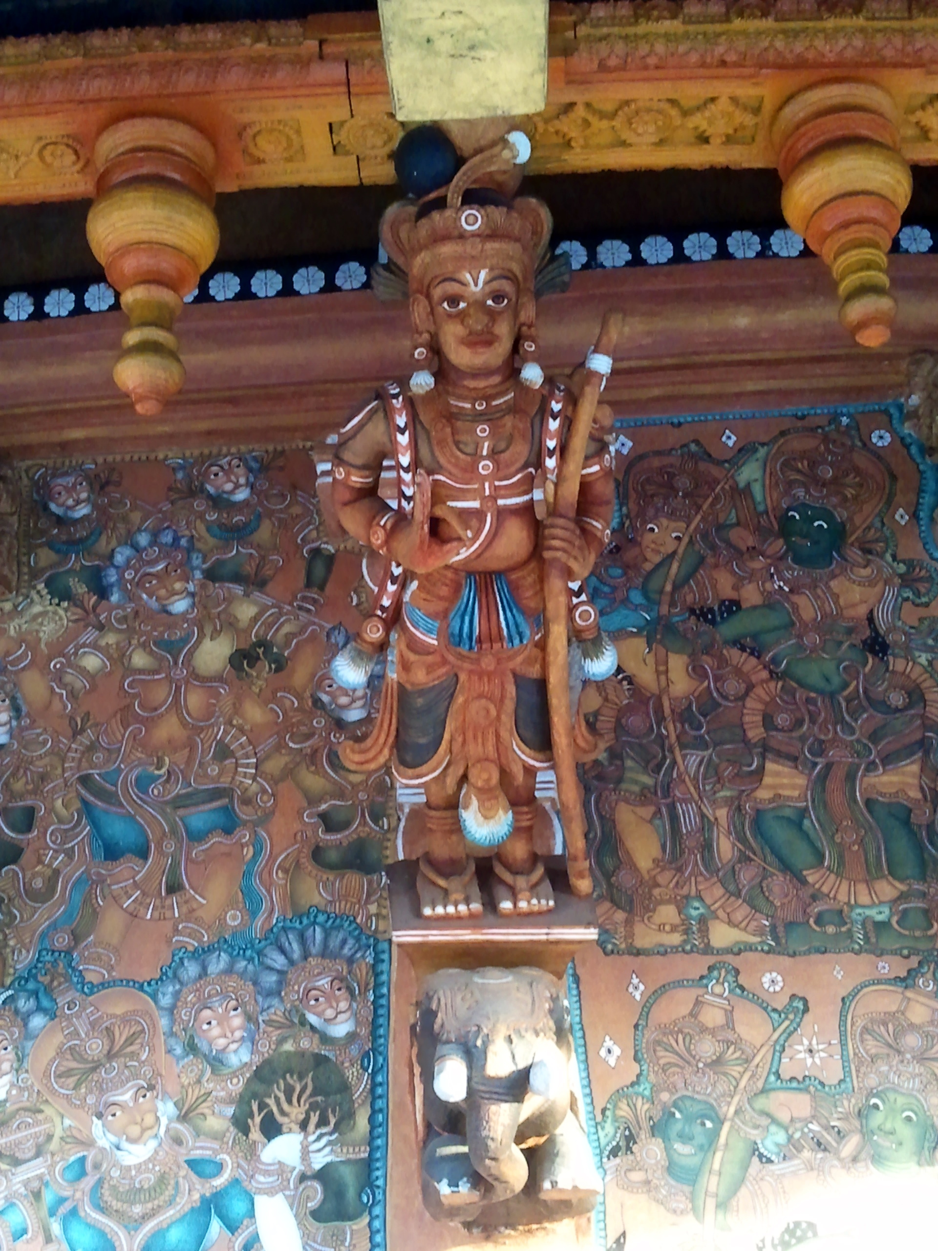 വൈക്കം മഹാദേവക്ഷേത്ര ശ്രീകോവിലിലെ ചുവർചിത്രങ്ങൾ